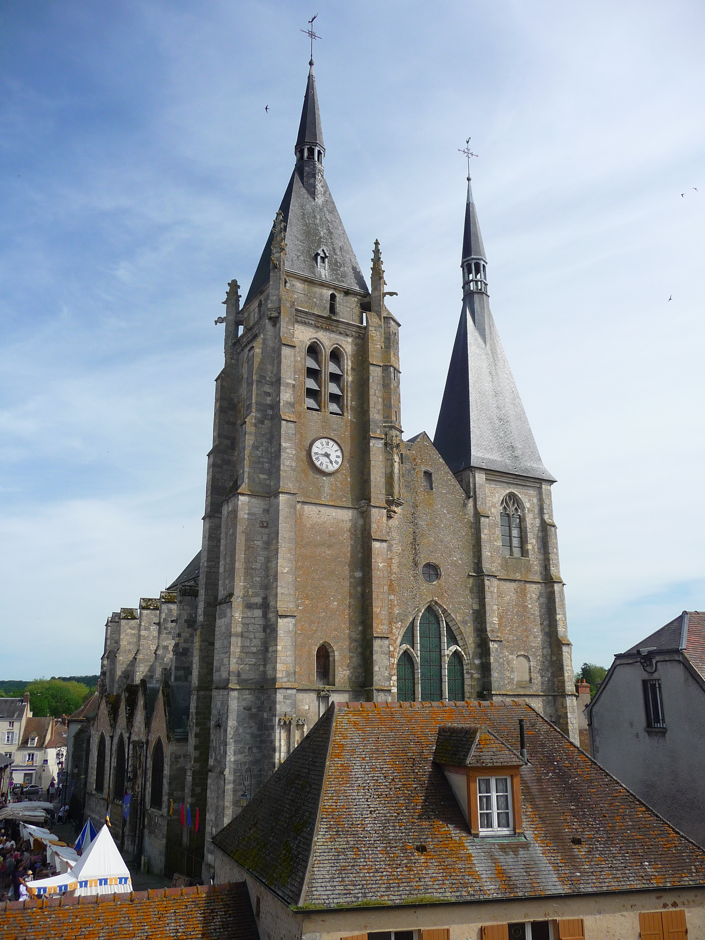 Église Saint-Germain-d'Auxerre de Dourdan, dans l'Essonne.